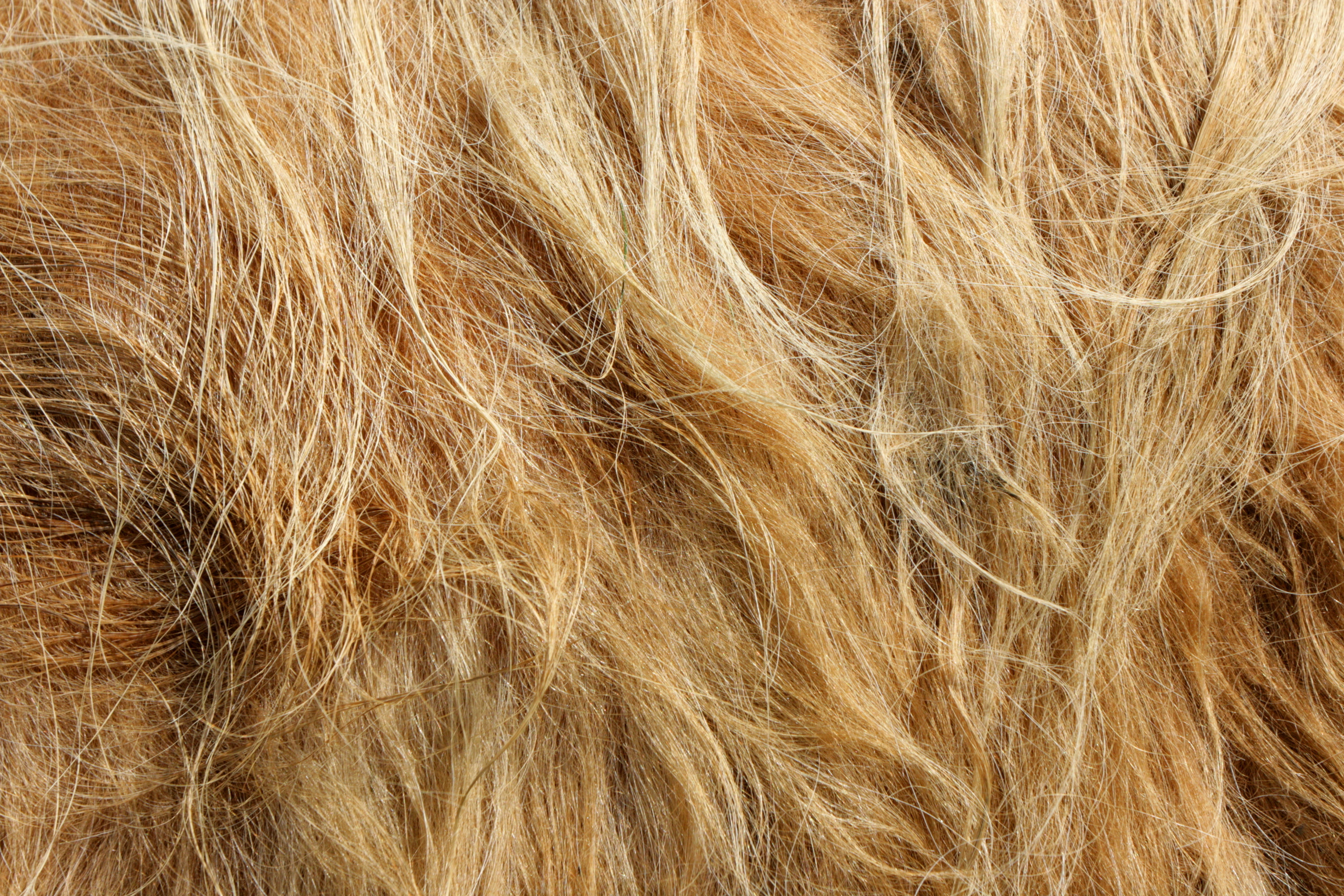 Wild- und Ziegenpark im Freizeit- und Campingpark Thräna, Buchholzer Straße 15 in Hohendubrau-Thräna